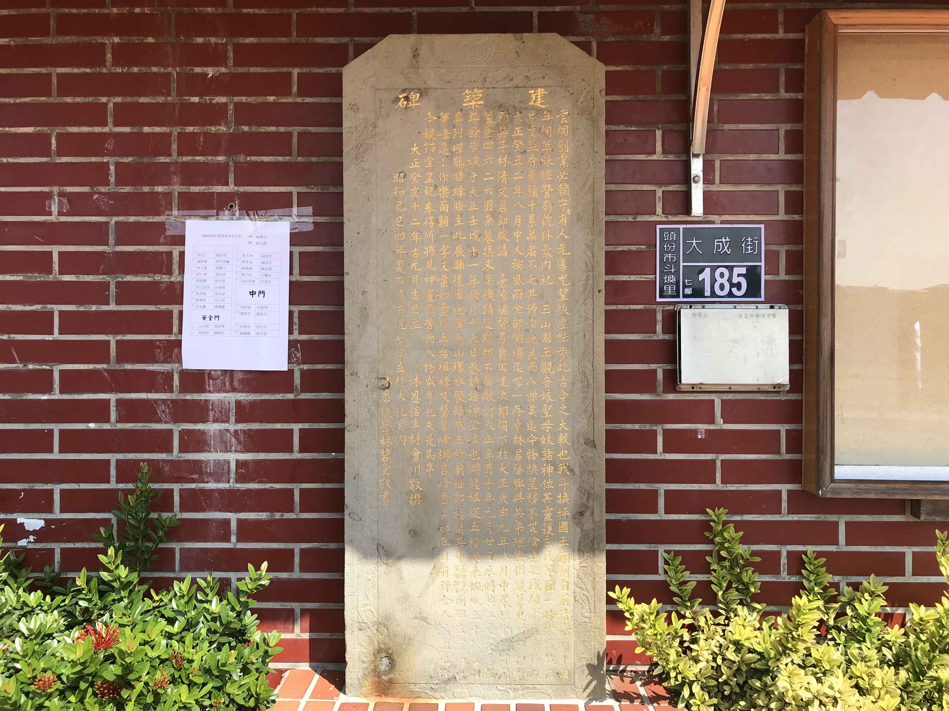 頭份大化宮建築碑與門牌